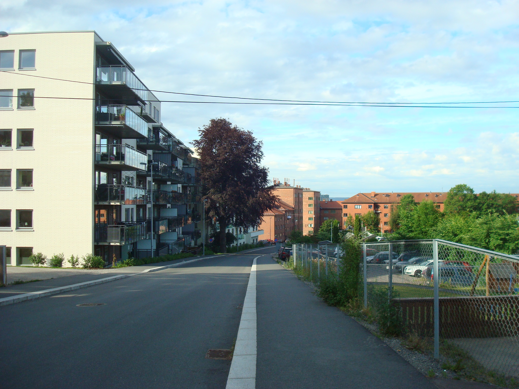 Jørgen Løvlands gate i Oslo ved Rodeløkkens kolonihager.